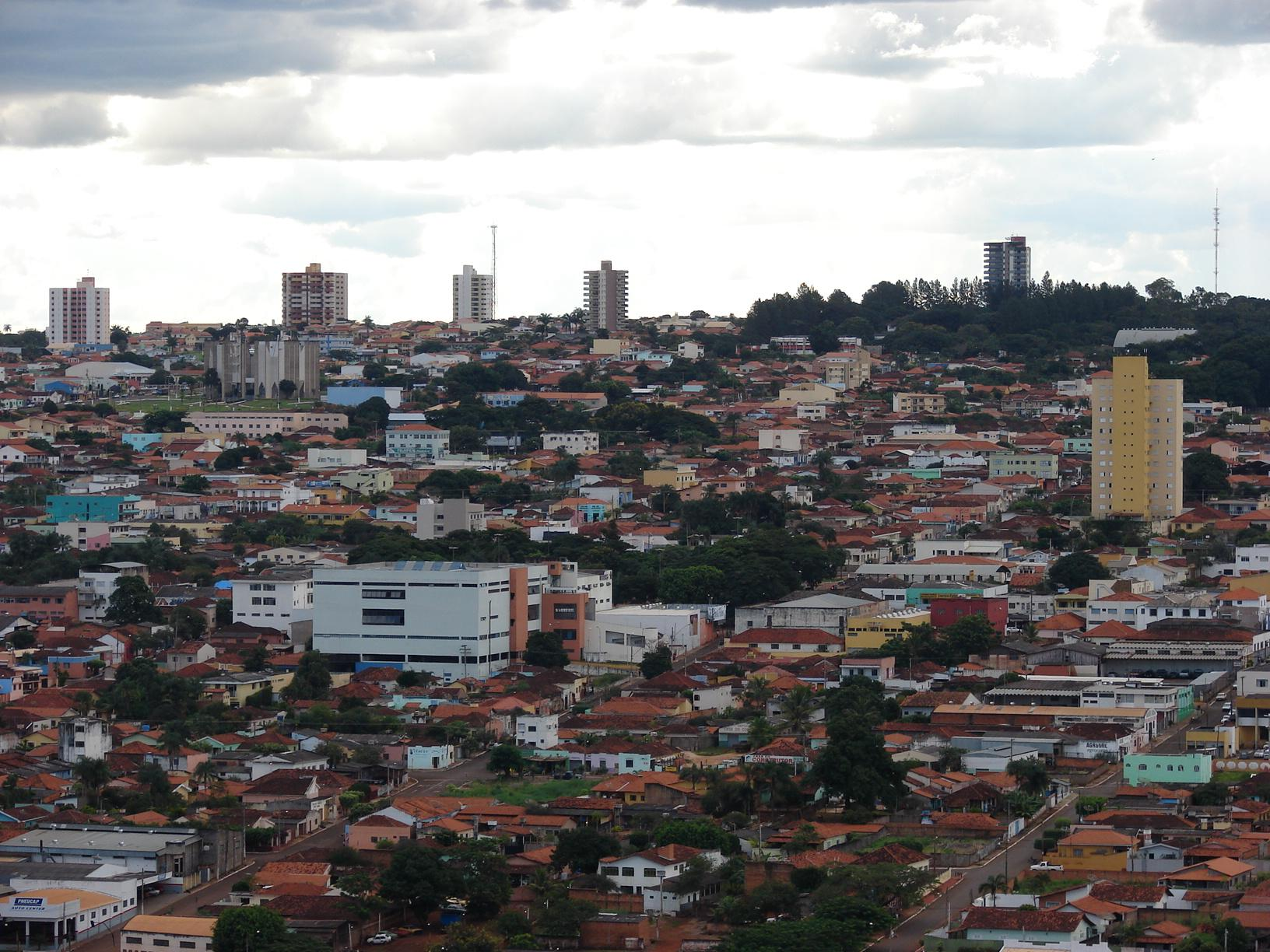 Cidade de Jataí-GO